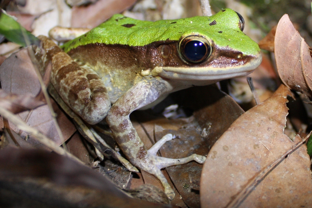 Taken in Tai Po Kau.